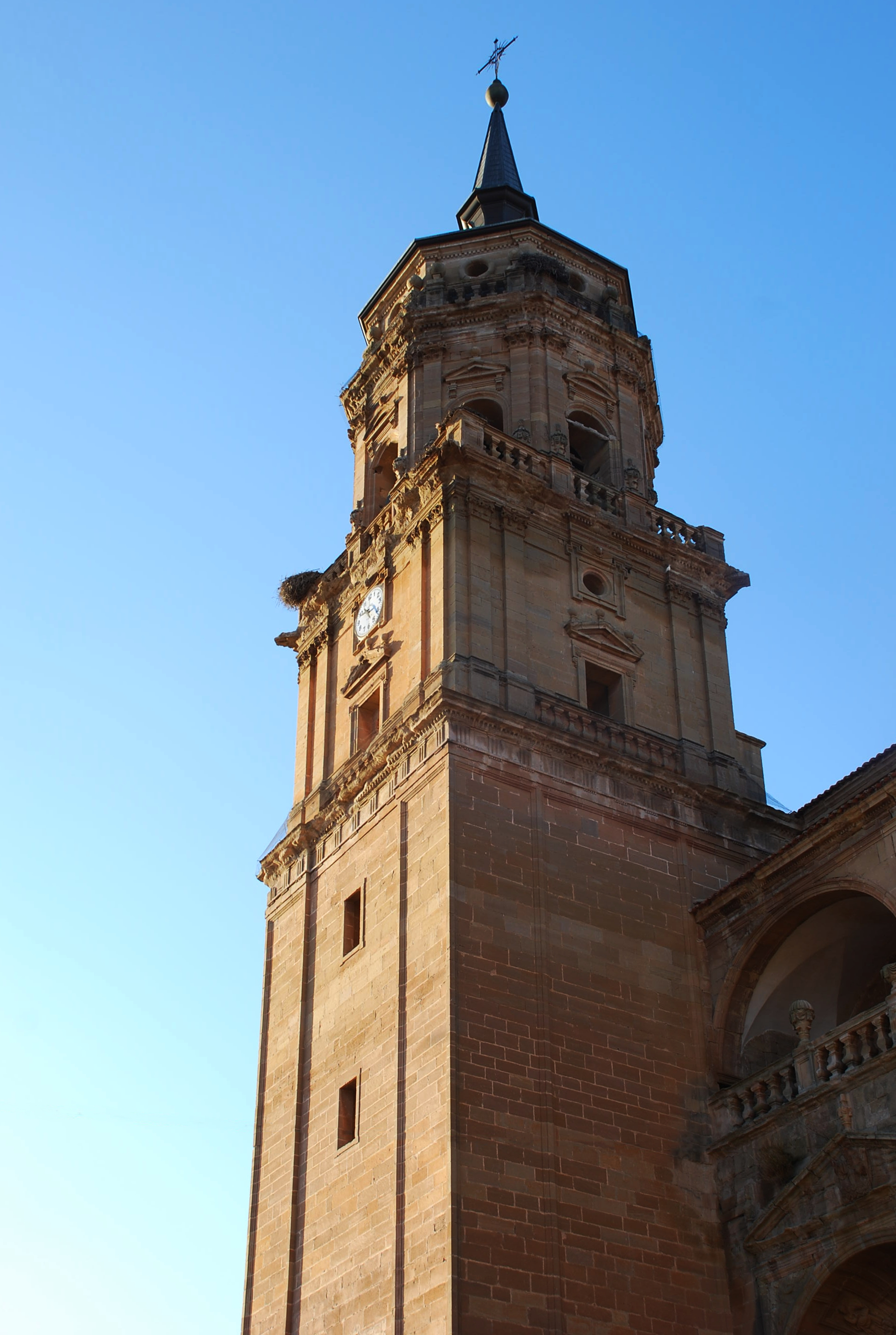 Torre de la iglesia de Murillo de Río Leza en La Rioja (España).